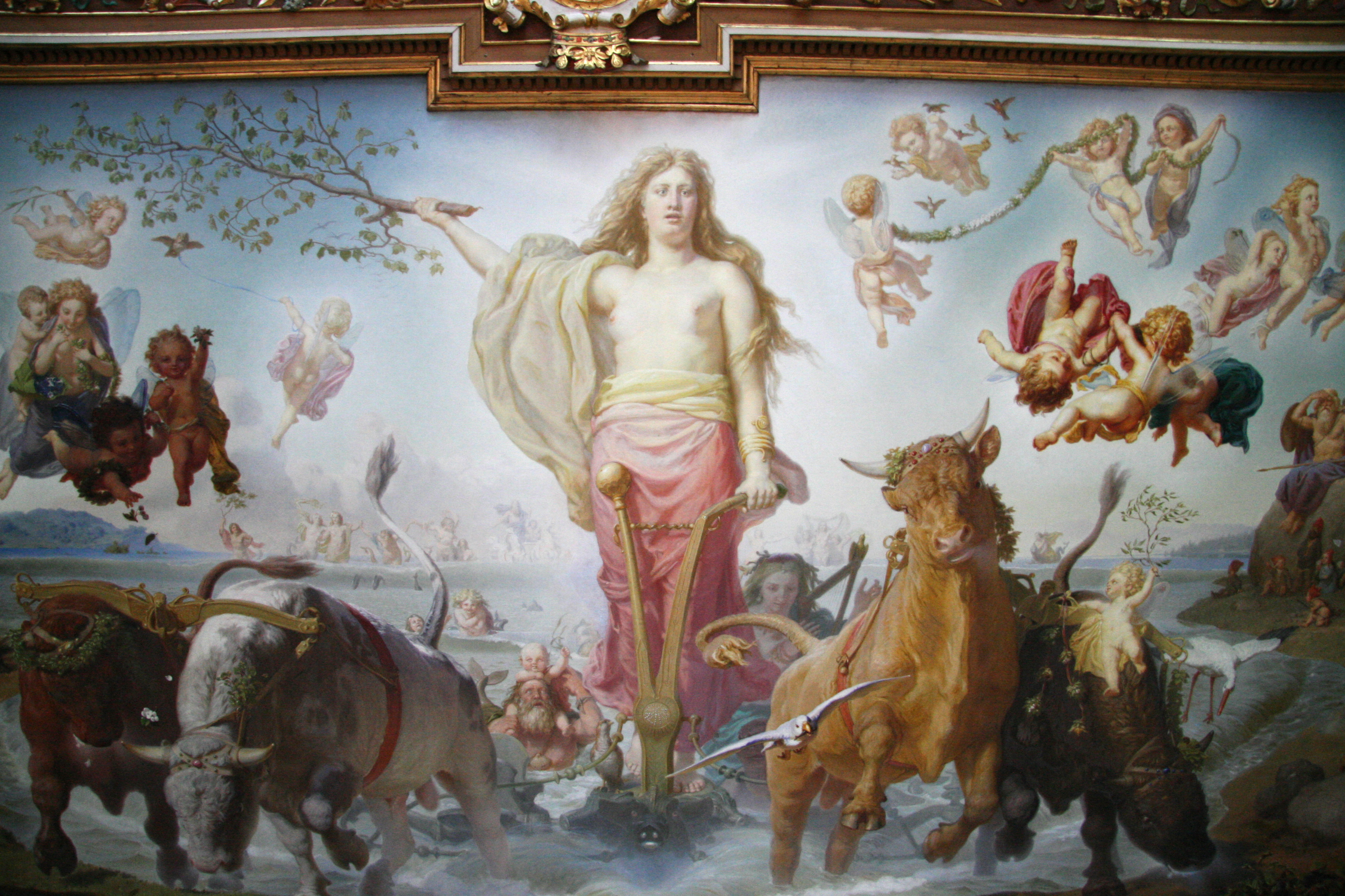 Frederiksborg Slot, Hillerød, Denmark. Ceiling decoration